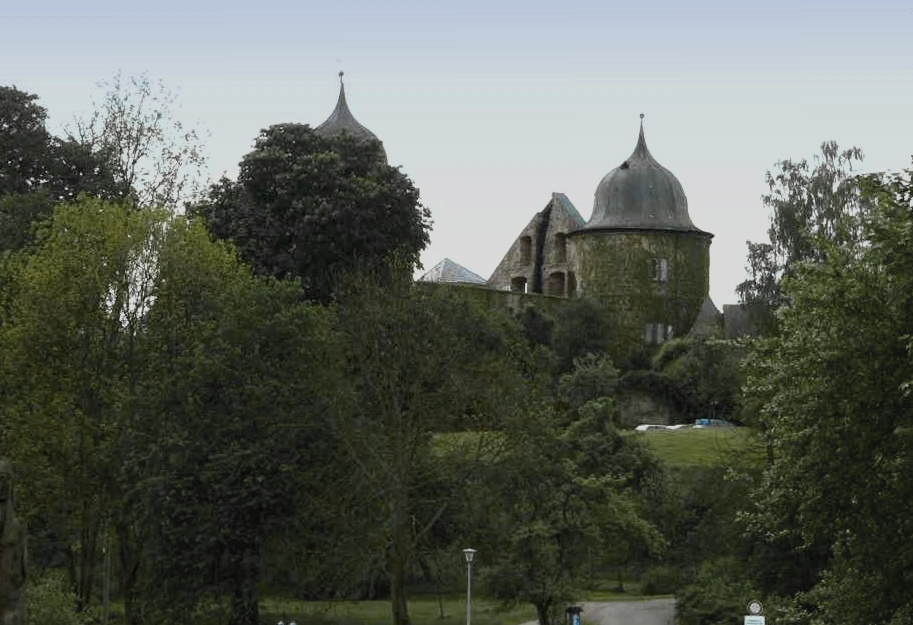 Sababurg im Reinhardswald, Hessen, Germany